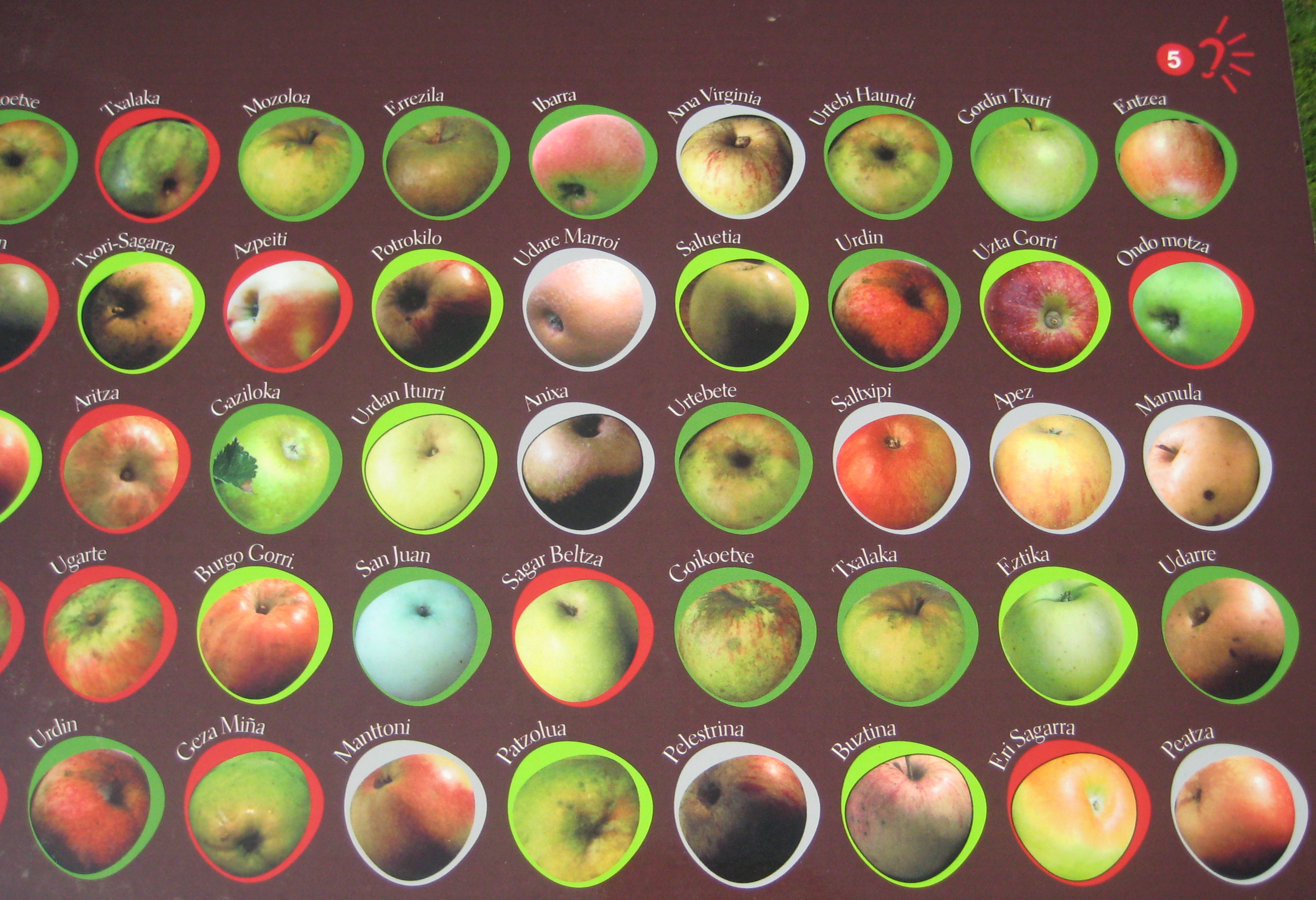 Sagardoetxea, Astigarraga. Gipuzkoa, Euskal Herria. Basque Cider Museum, Astigarraga. Gipuzkoa. Euskal Herria.